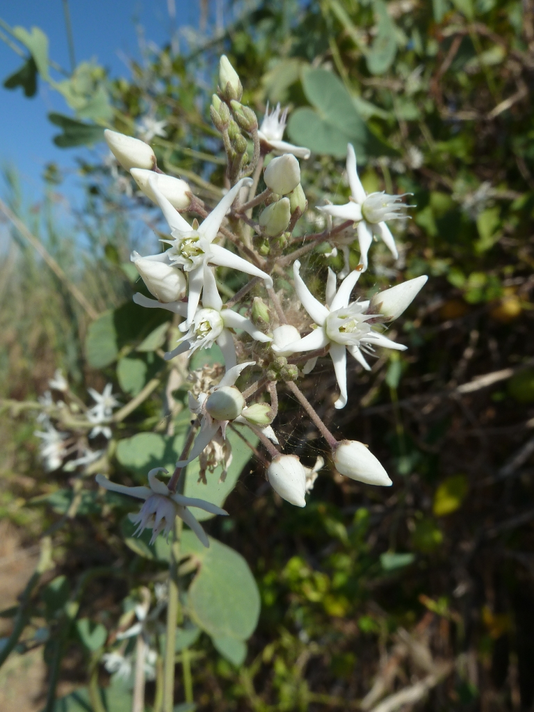 Cynanchum acutum (Matacán): inflorescencia - La Huerta/Camino de la Azarbe de Patricio - Albatera (Alicante, España).